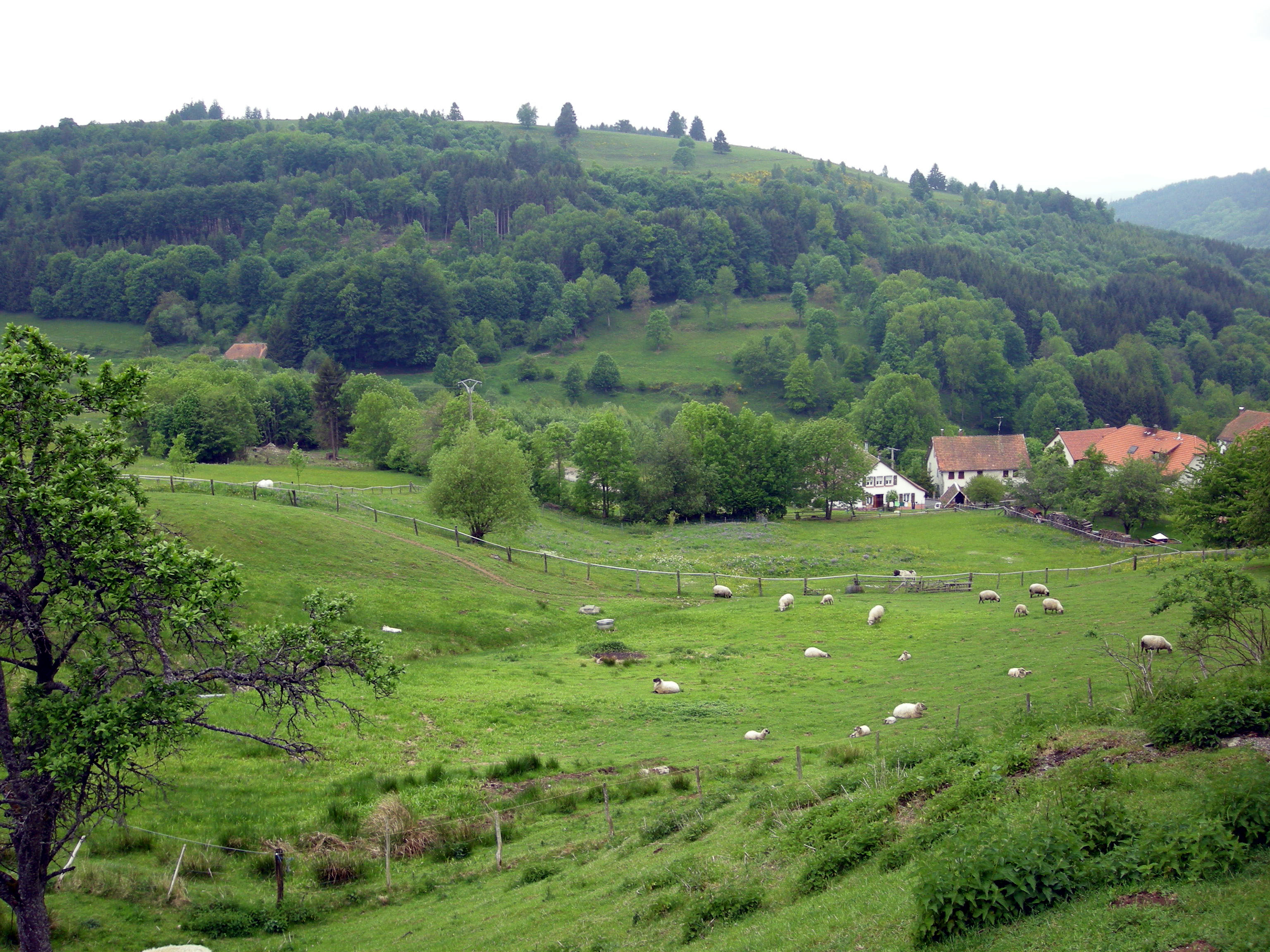 Paysage à Bellefosse (Bas-Rhin)